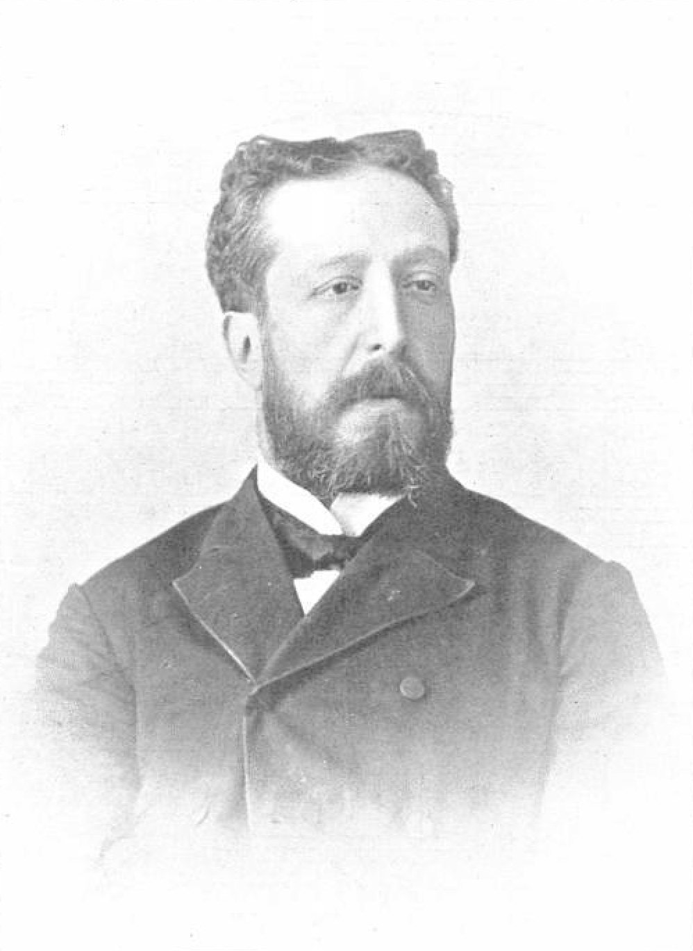 Celestí Barallat y Falguera.